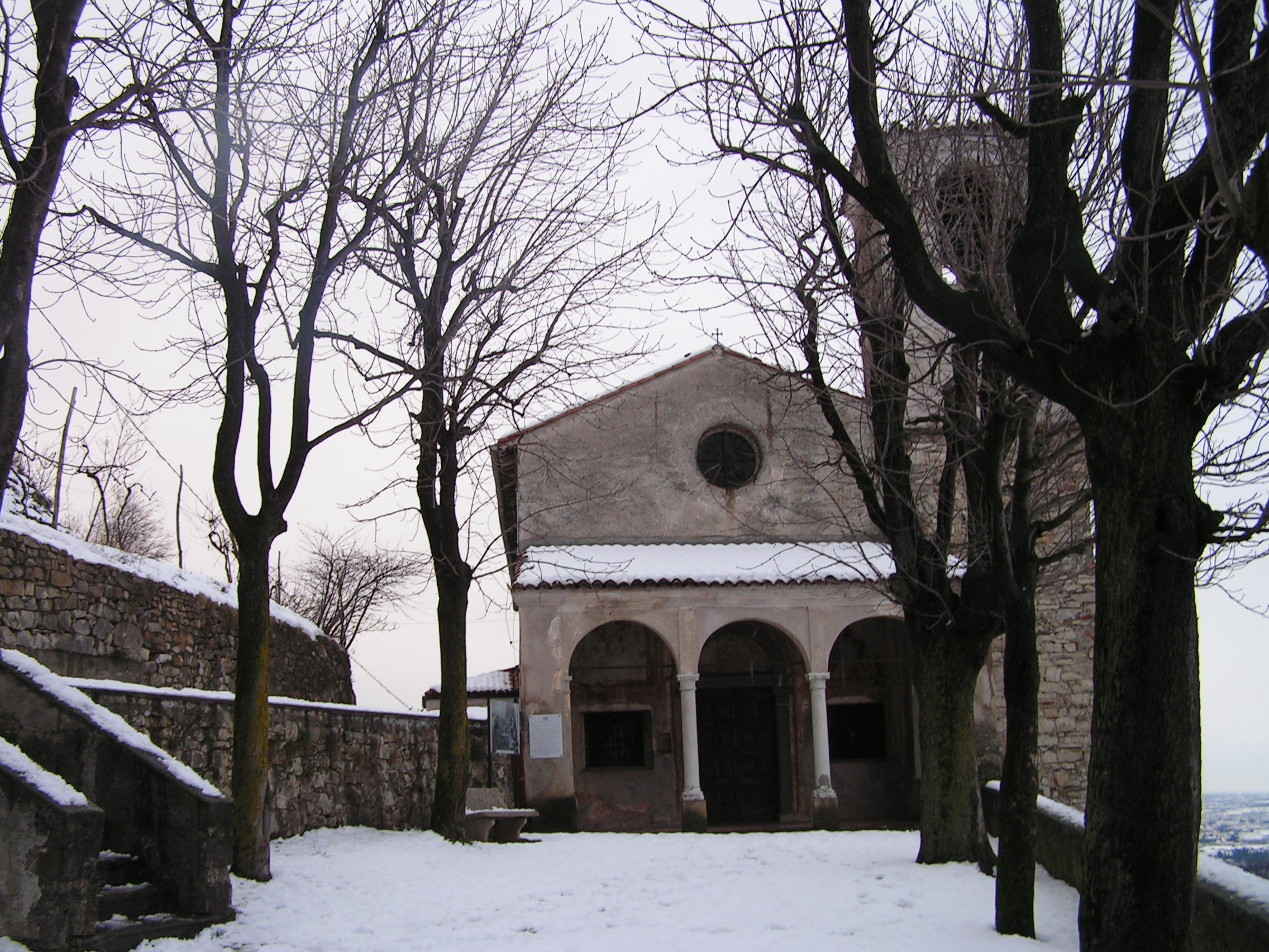 Vista della Madonna del Corno innevata dal lato dell'entrata della chiesa.